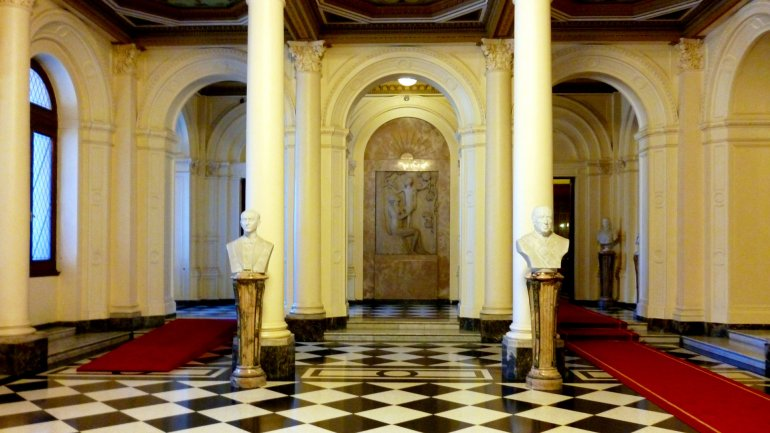 Hall de Honor, Galería de Bustos en el Palacio de gobierno de la República Argentina